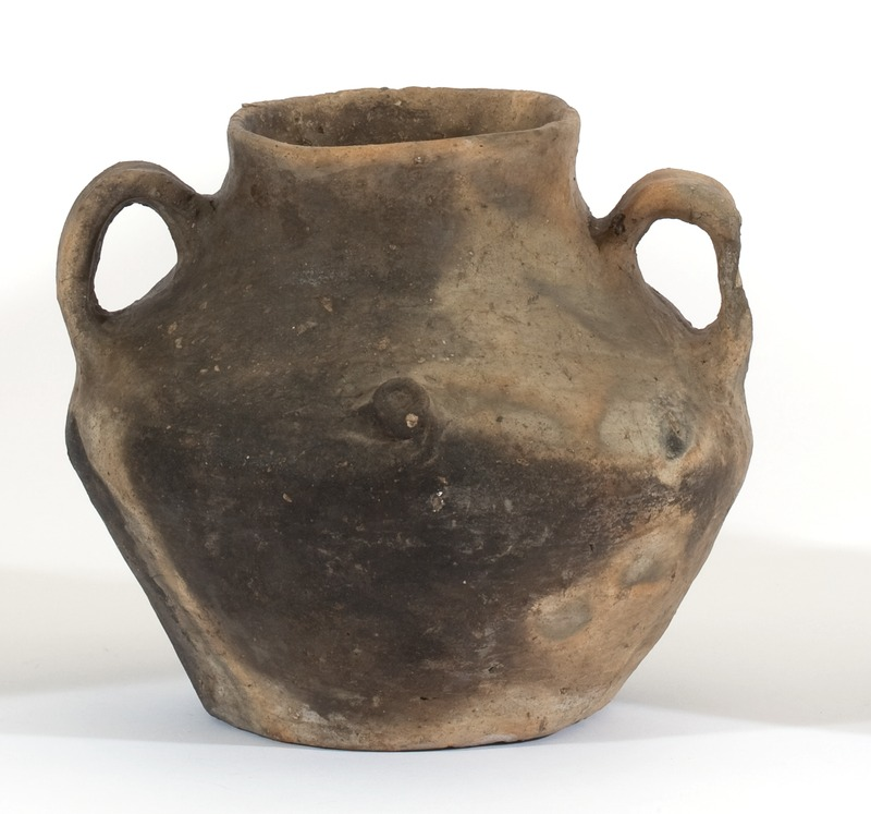 Anfora dal profilo biconico-globoso, orlo arrotondato, svasato verso l'esterno, fondo piatto, due anse a nastro alternate a due bugnette coniche appiattite.